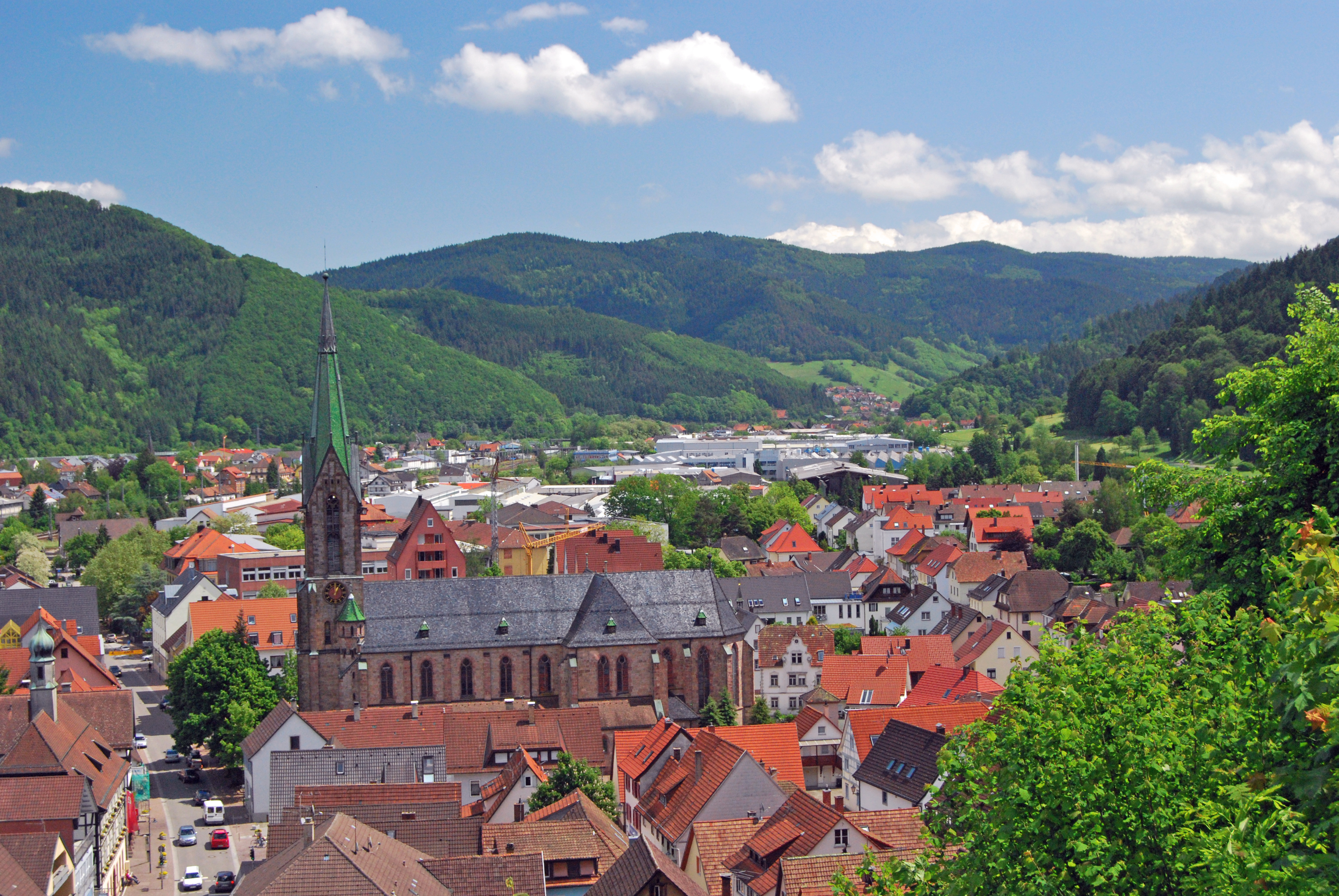 Hausach